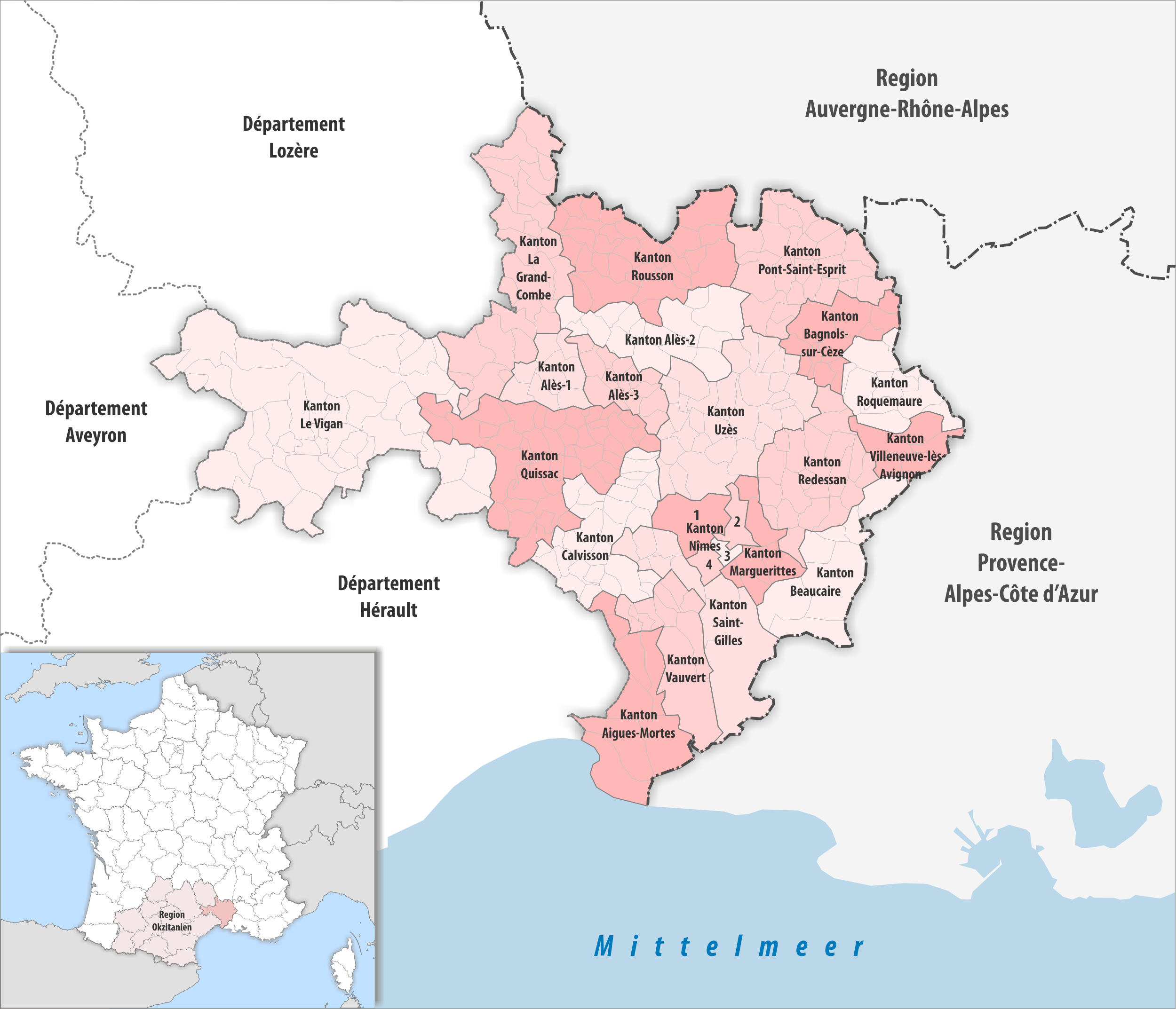 Gemeinden und Kantone im Departement Gard